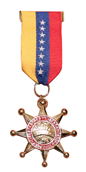 Orden Libertadores y Libertadoras de Venezuela